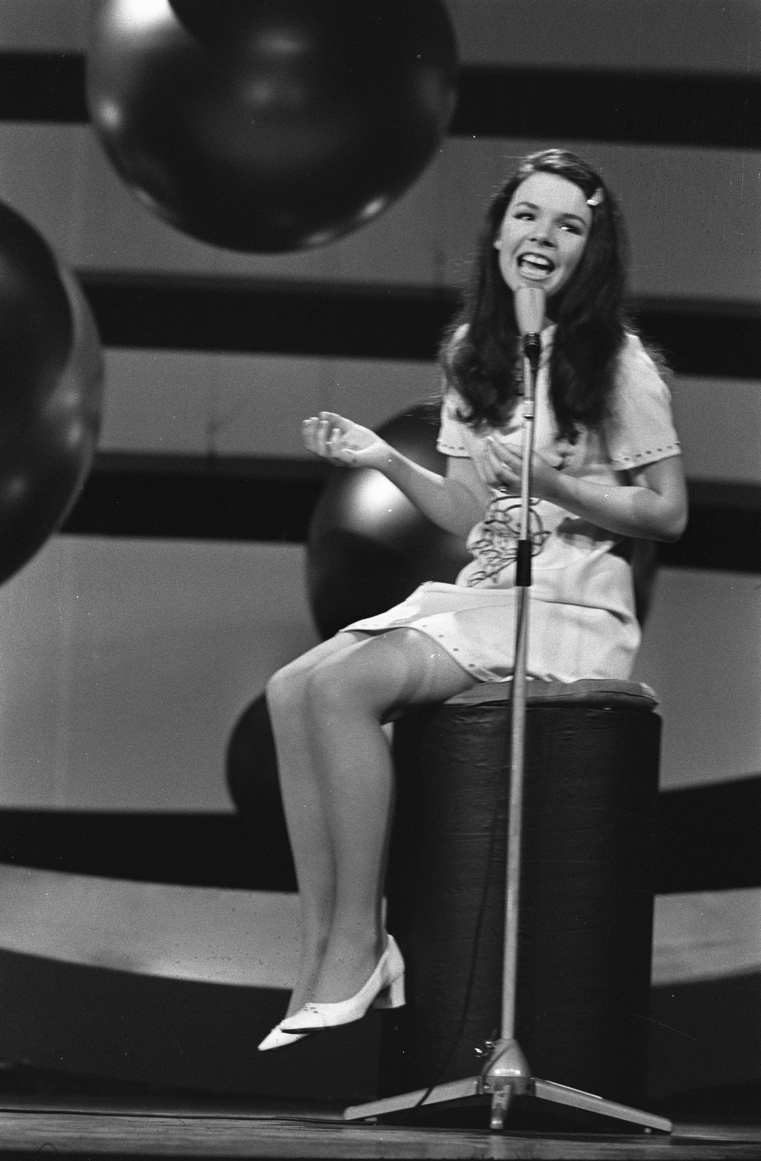 Collectie / Archief : Fotocollectie Anefo Reportage / Serie : Eurovisie Songfestival 1970 in RAI te Amsterdam Beschrijving : Winnares Dana (Ierland) zingt Datum : 21 maart 1970 Locatie : Amsterdam, Ierland Trefwoorden : artiesten, songfestivals, zangers Persoonsnaam : Dana Instellingsnaam : Eurovisie Song Festival Fotograaf : Koch, Eric / Anefo Auteursrechthebbende : Nationaal Archief Materiaalsoort : Negatief (zwart/wit) Nummer archiefinventaris : bekijk toegang 2.24.01.05 Bestanddeelnummer : 923-3688